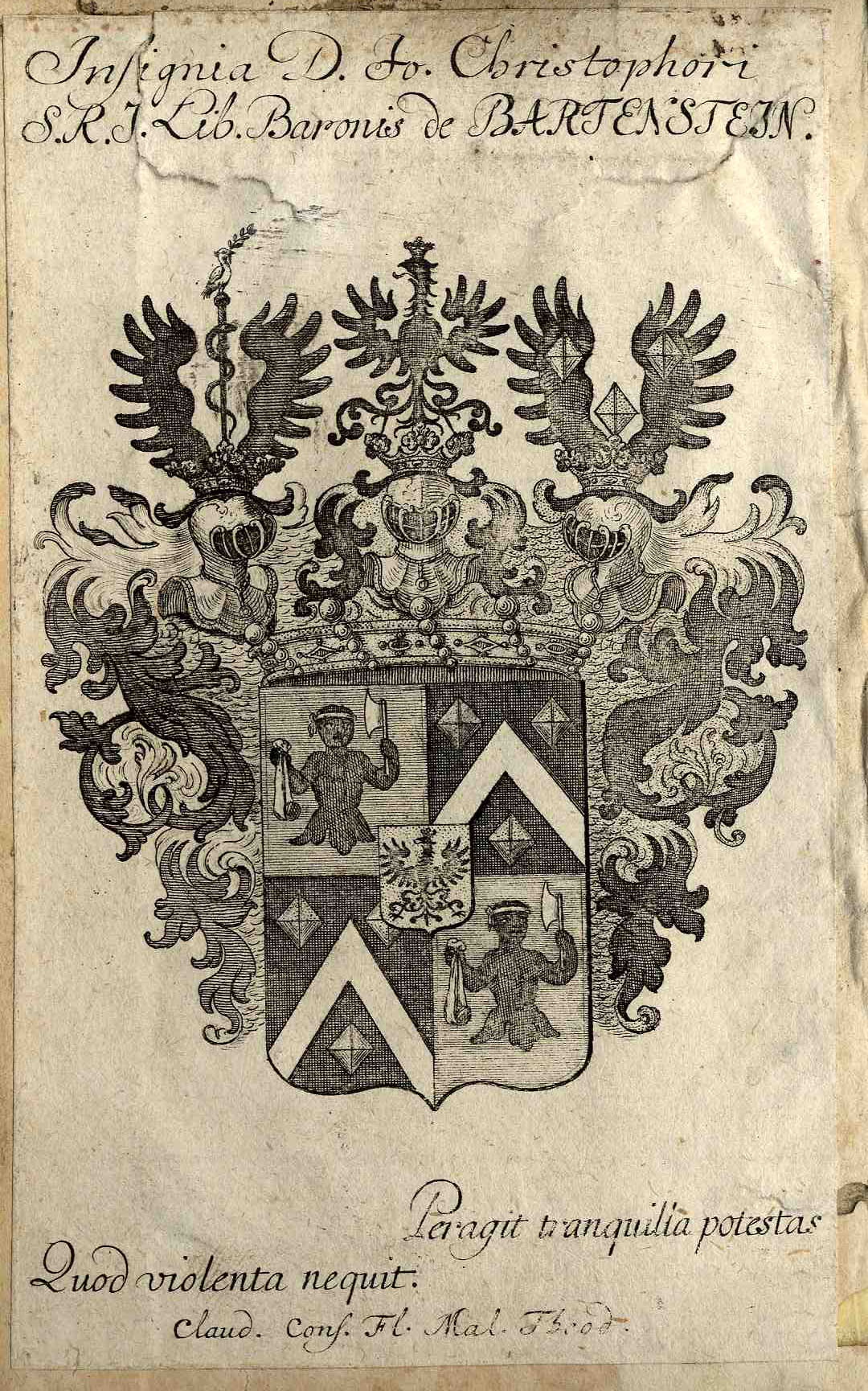 Ex Libris mit Wappen des Johann Christoph von Bartenstein